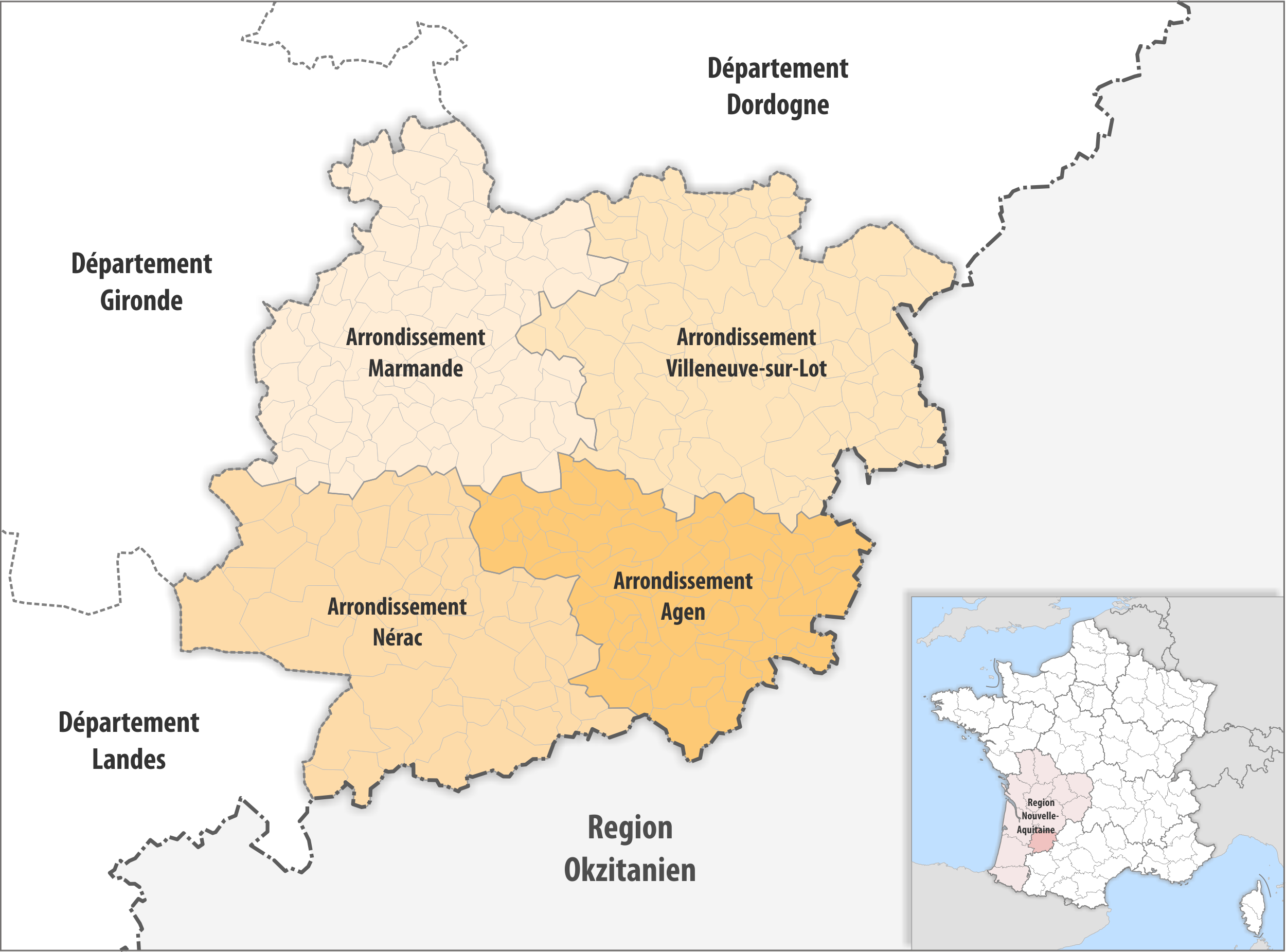 Gemeinden und Arrondissemente im Departement Lot-et-Garonne